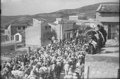 מירון - הלולה דרבי שמעון בר-יוחאי במירון - הקהל במירון.